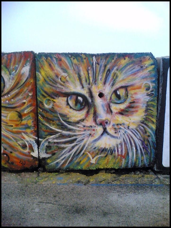 Molo sud murales "Museo d’Arte sul Mare"